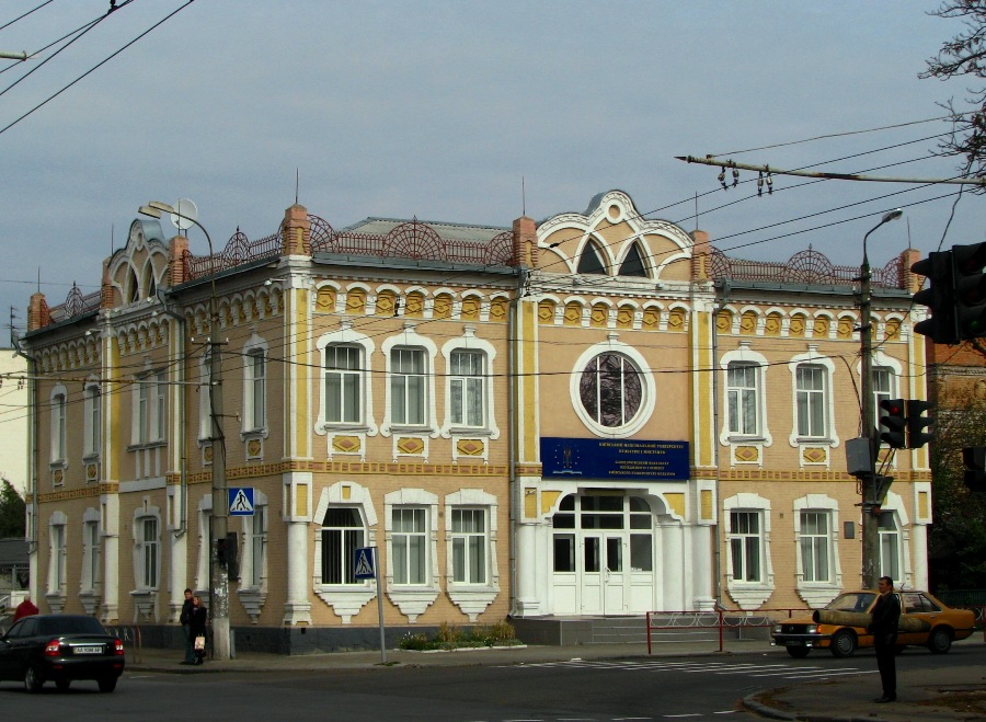 Будинок Таубіна (Біла Церква)